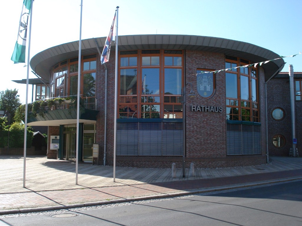 Mairie d´Emstek